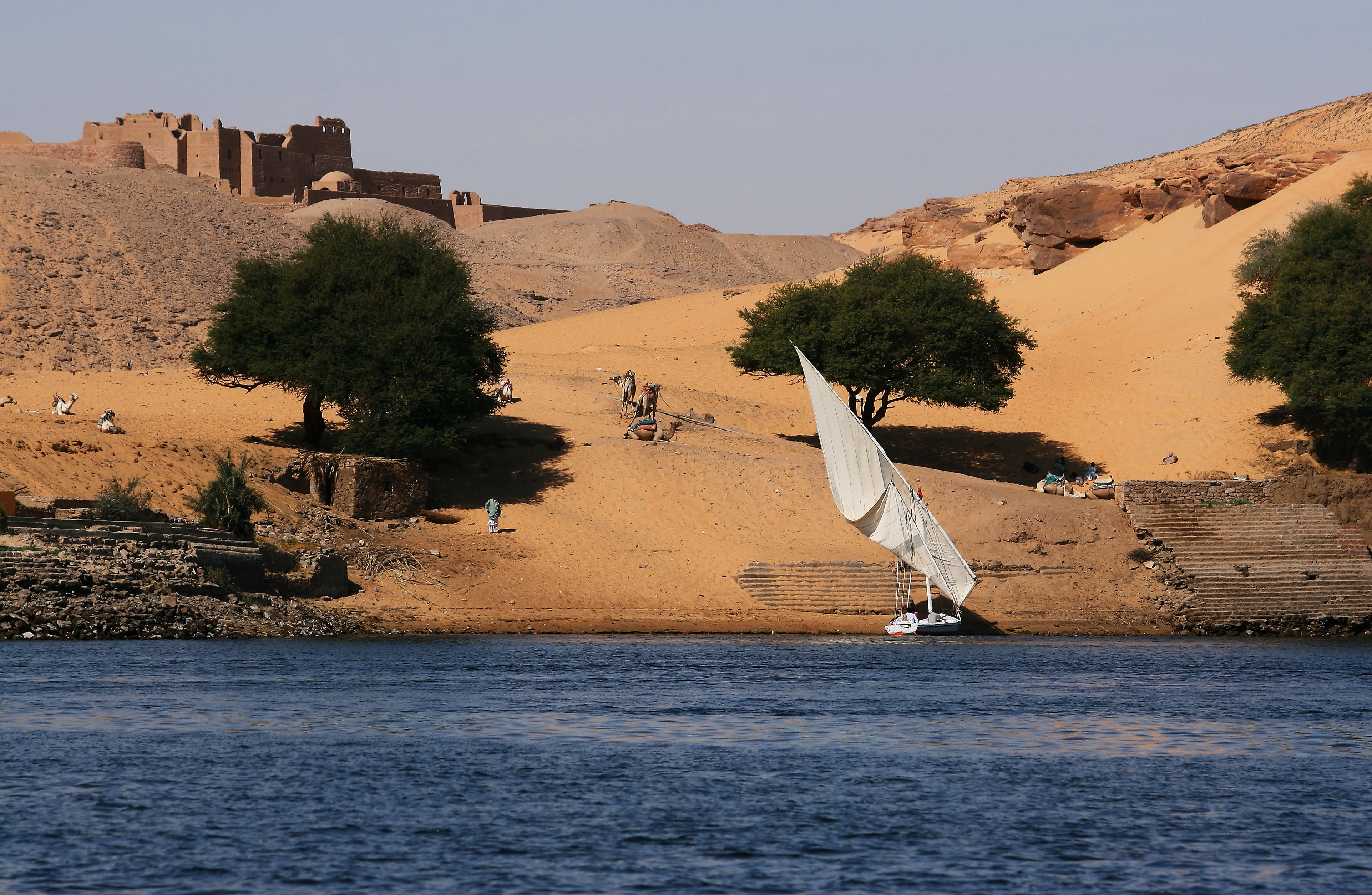 Bei Assuan, linkes Nilufer